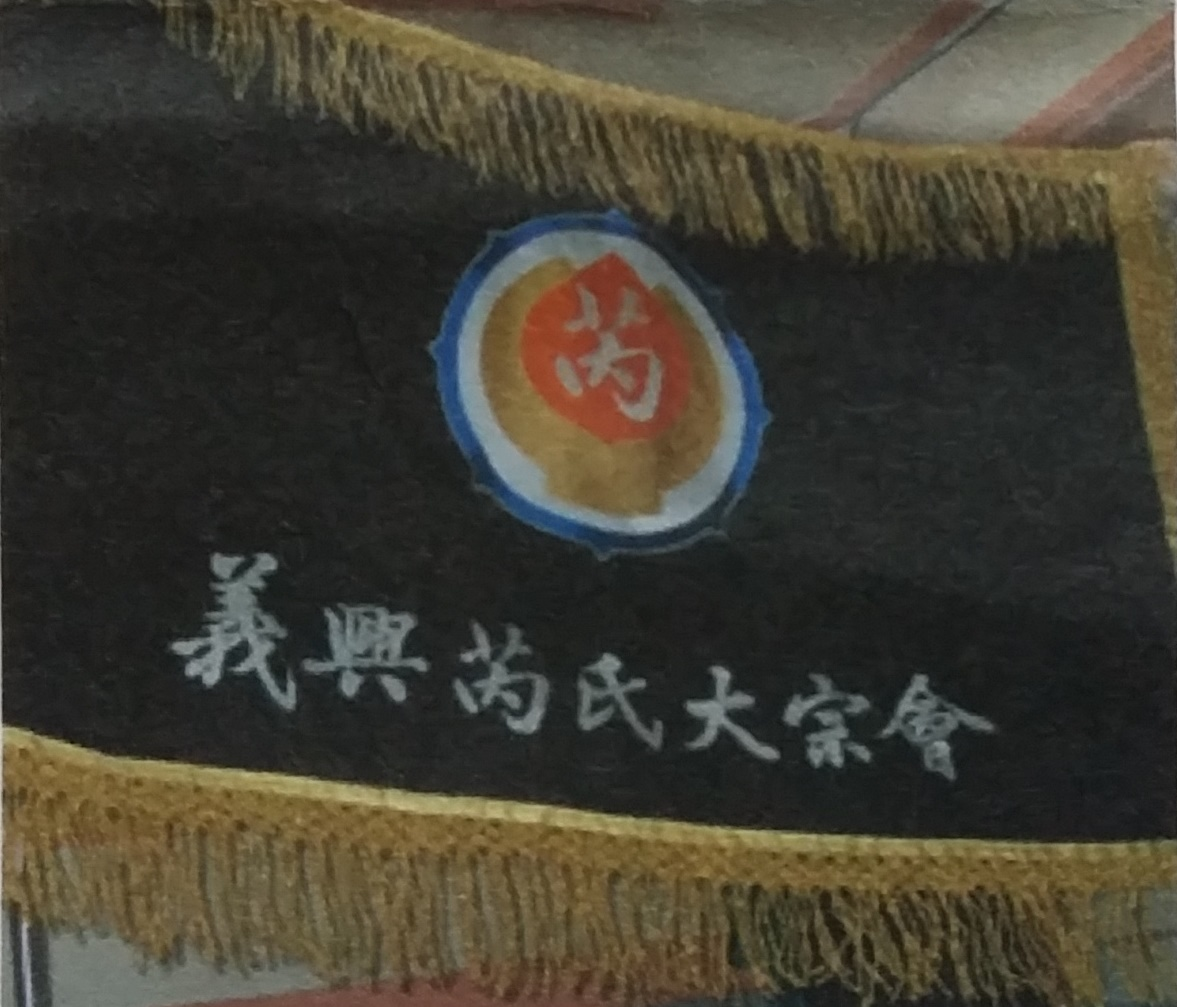 의흥예씨 대종회를 상징하는 깃발